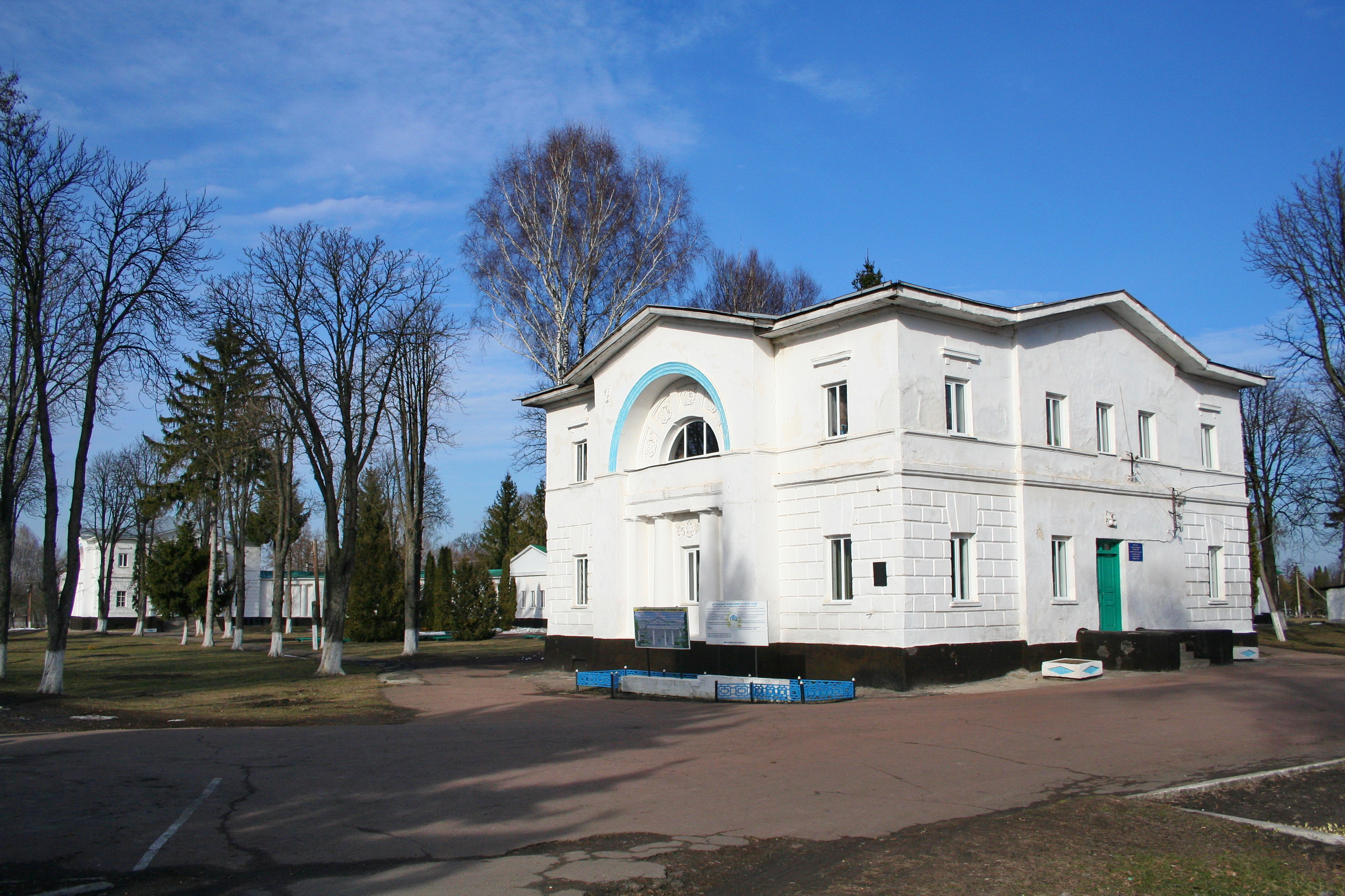 Садибний будинок (мур.), де бував Т.Г. Шевченко (1845), Дігтярі, лівий берег р.Лісогір, СПТУ